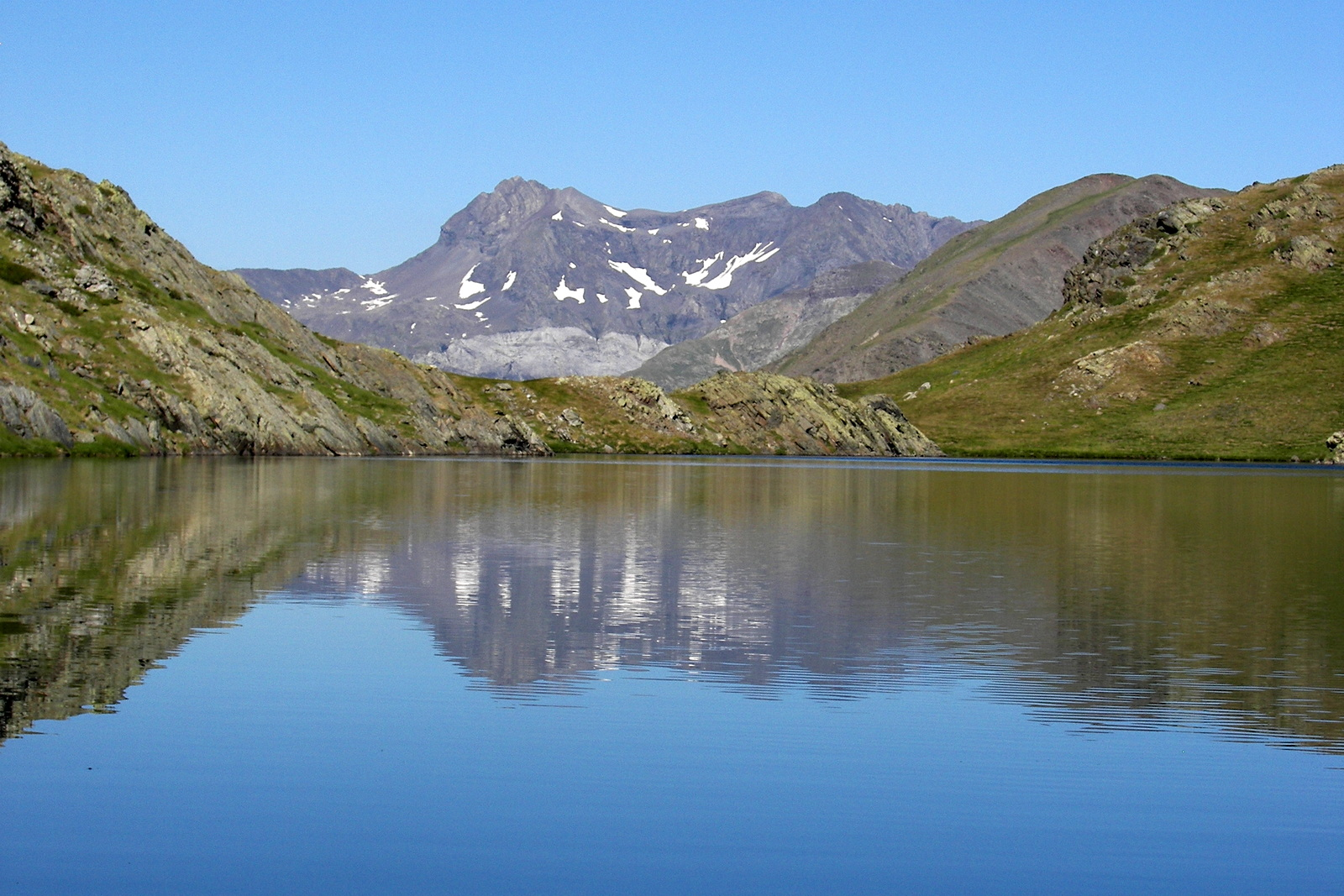 Alto Valle del Cinca This is a photography of a Site of Community Importance in Spain with the ID: ES2410052. Natura2000 entry, EEA entry